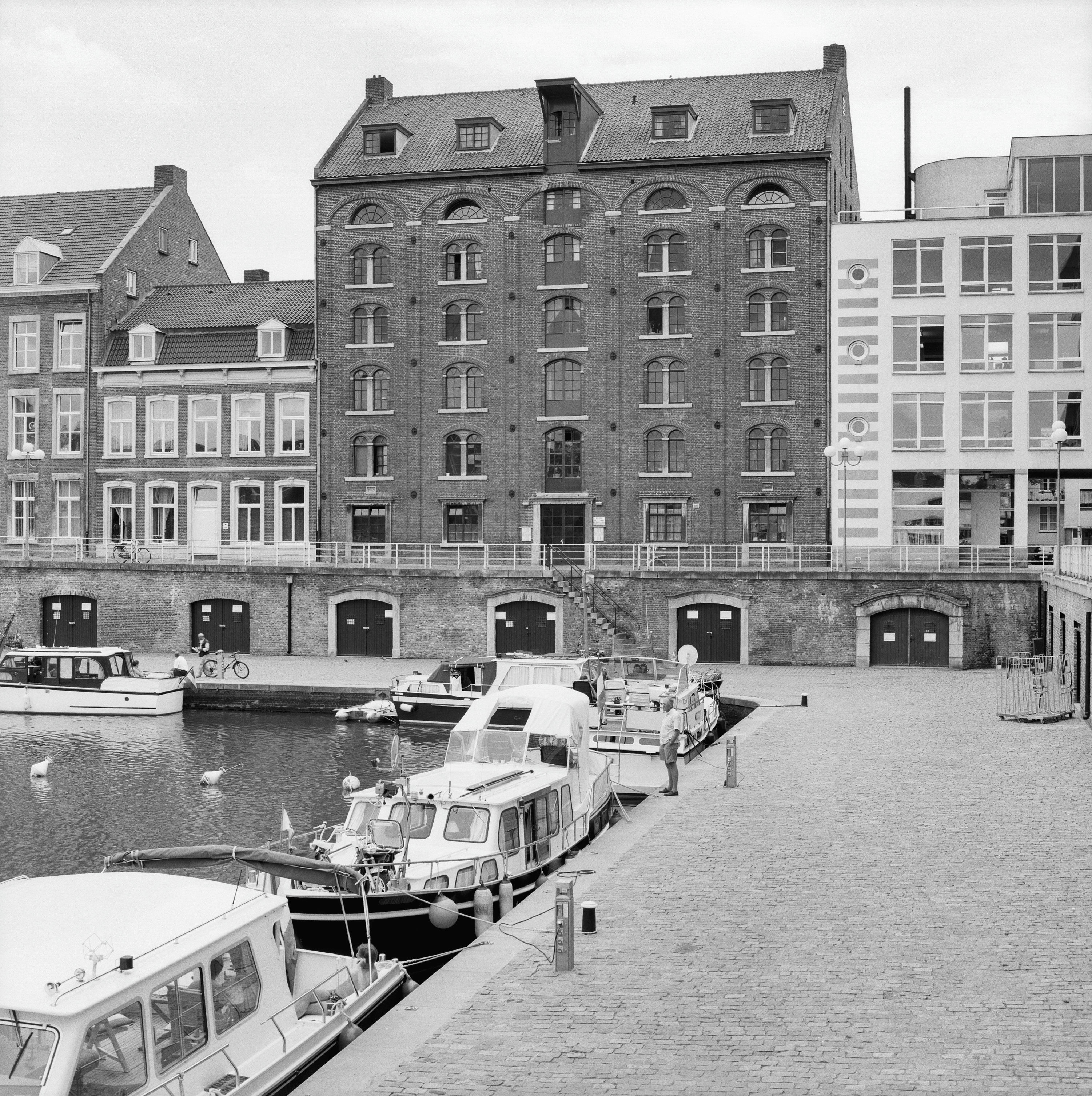 Maastrichts Veem: Overzicht voorgevel voormalig pakhuis met werfkelders (opmerking: Gefotografeerd voor Monumenten In Nederland Limburg)